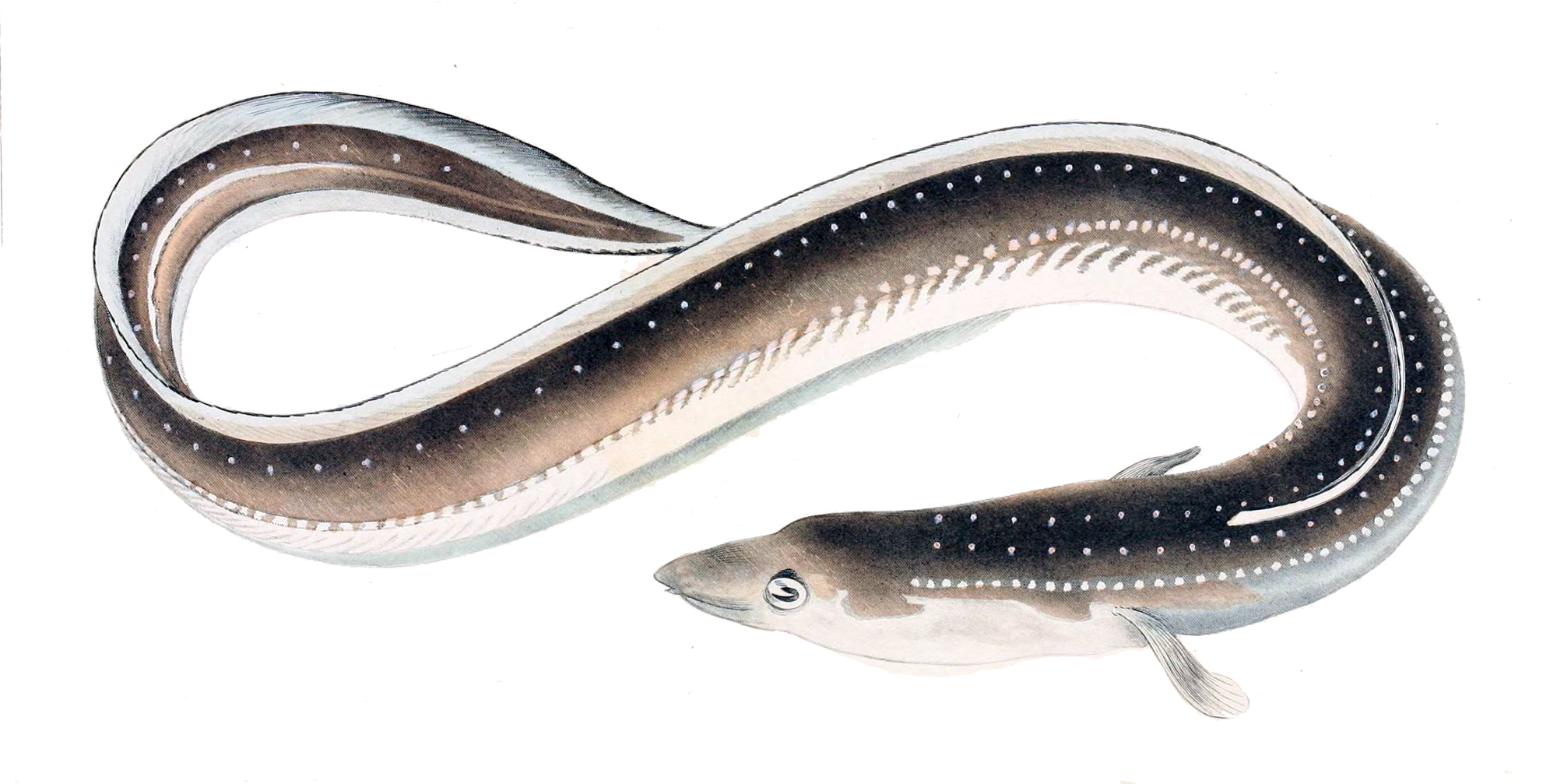 Anguilla japonica